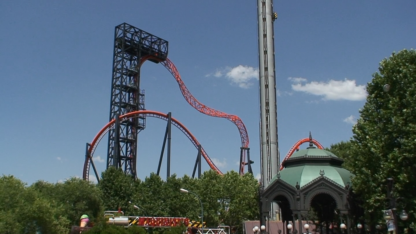 The roller coaster Abismo at Parque de Atracciones de Madrid